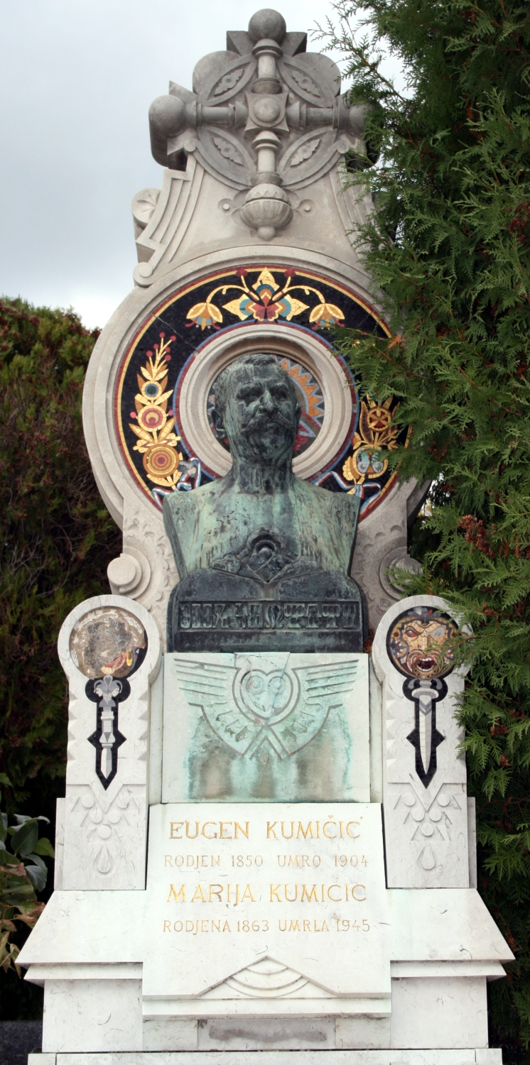 grob Eugena Kumičića na Mirogoju u Zagrebu, Hrvatska